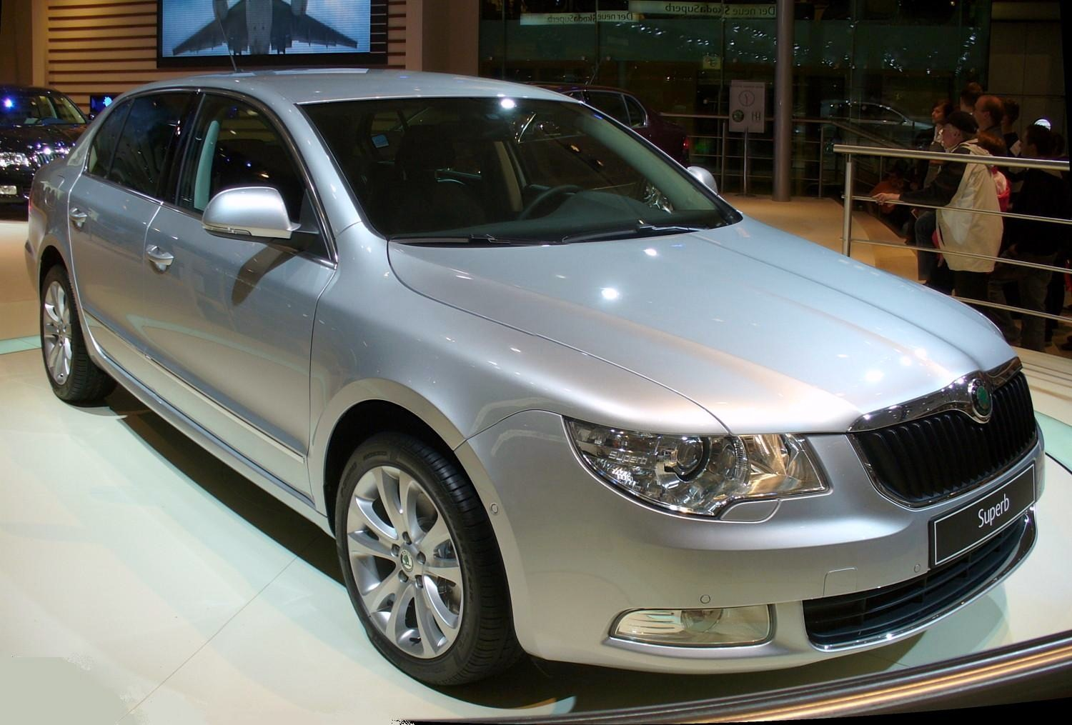 Škoda Superb